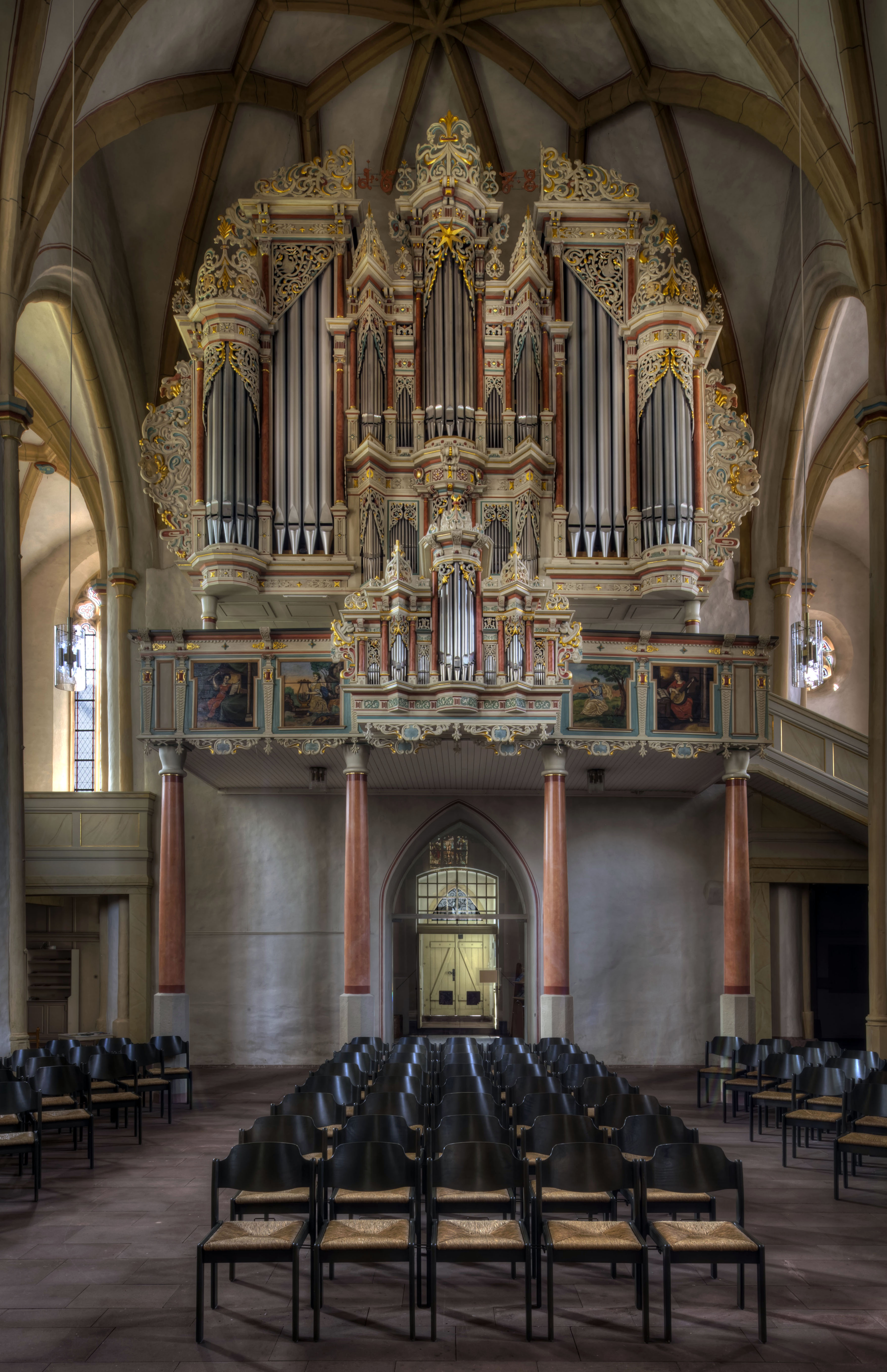 Orgel von Jost Friedrich Schaeffer von 1677/79